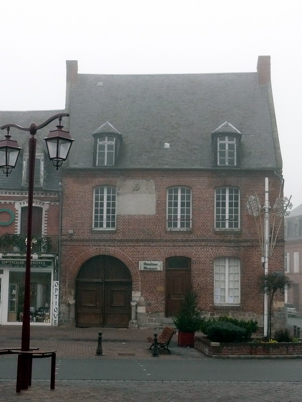 L'ancienne Auberge de l'Écu de Crevecœur-le-Grand (Oise) où Alexandre Dumas fit s'arrêter l'un de ses Trois mousquetaires